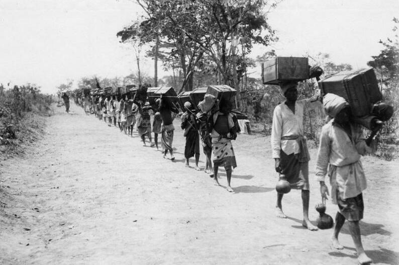 Exzellenz Dernburg in Ostafrika Träger auf dem Marsch